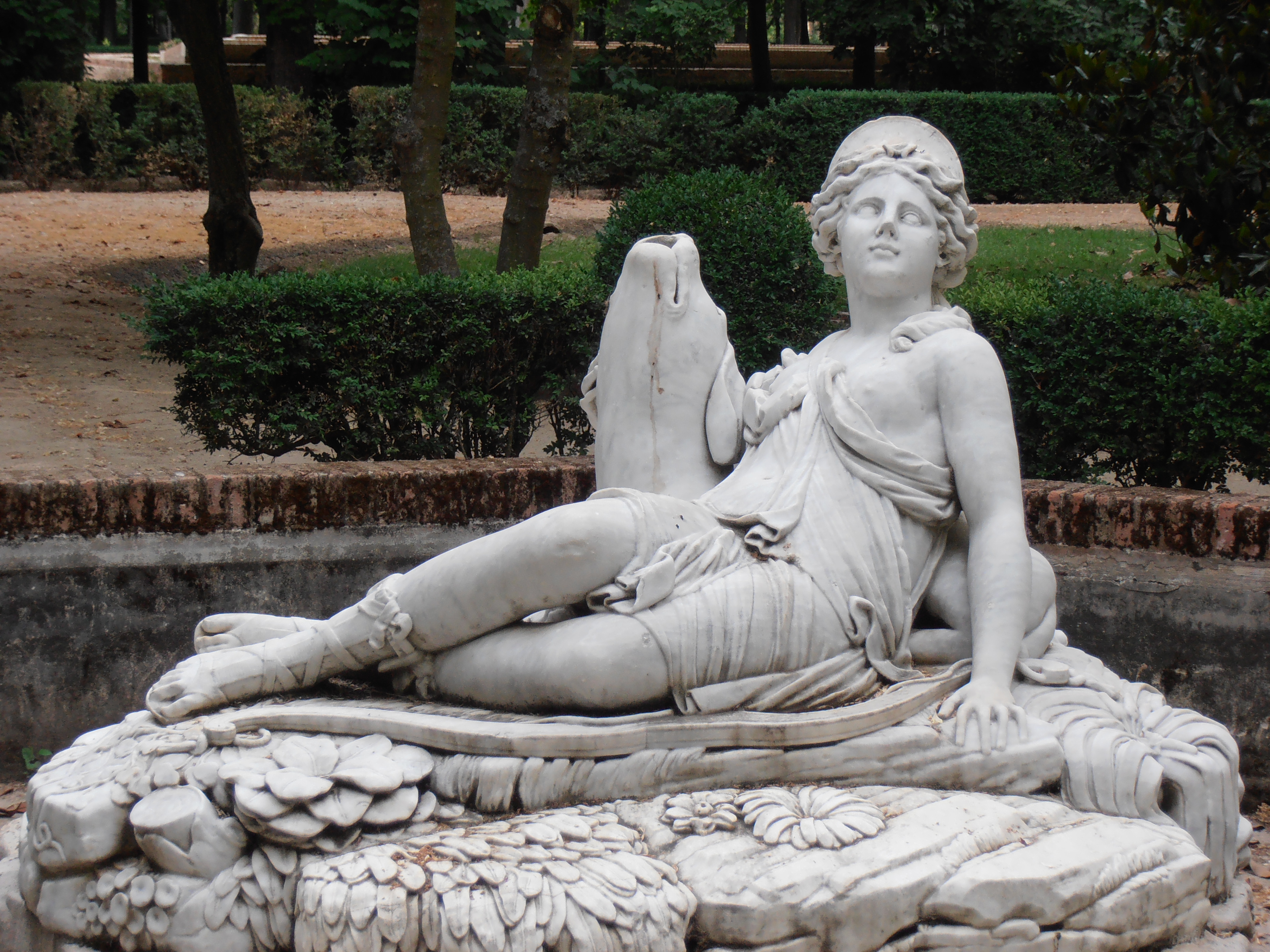 Diana